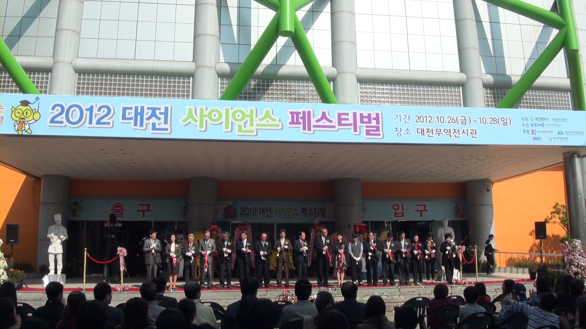 2012 대전사이언스페스티벌 개막식